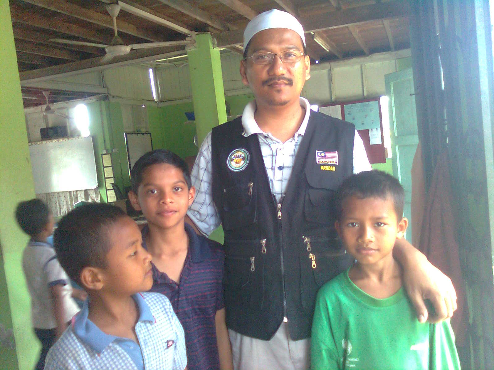 Bergambar bersama anak-anak tempatan selepas menyerahkan bantuan kepada penduduk setempat